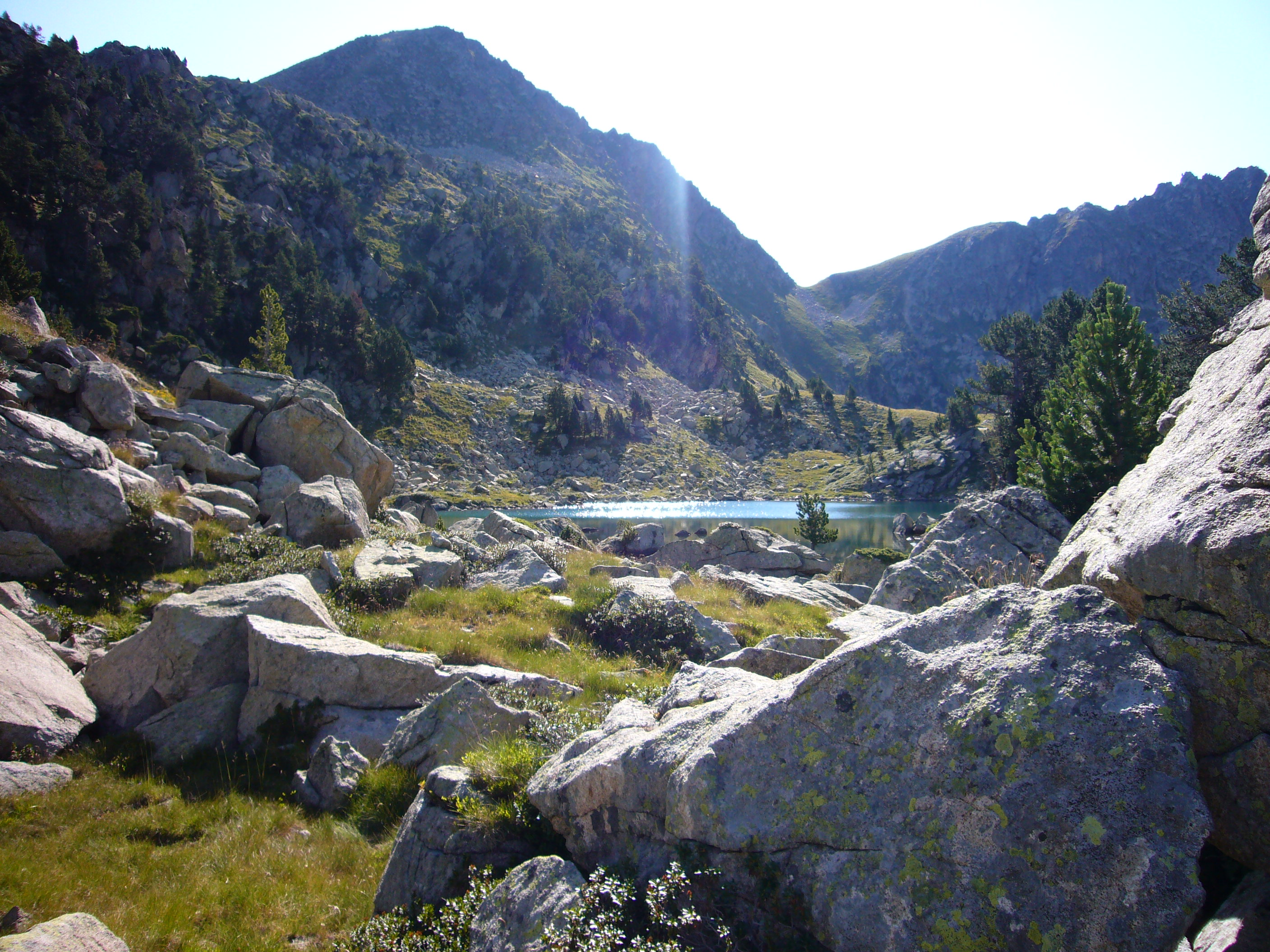 Bassa de les Granotes; la Vall de Boí, Alta Ribagorça, Catalunya